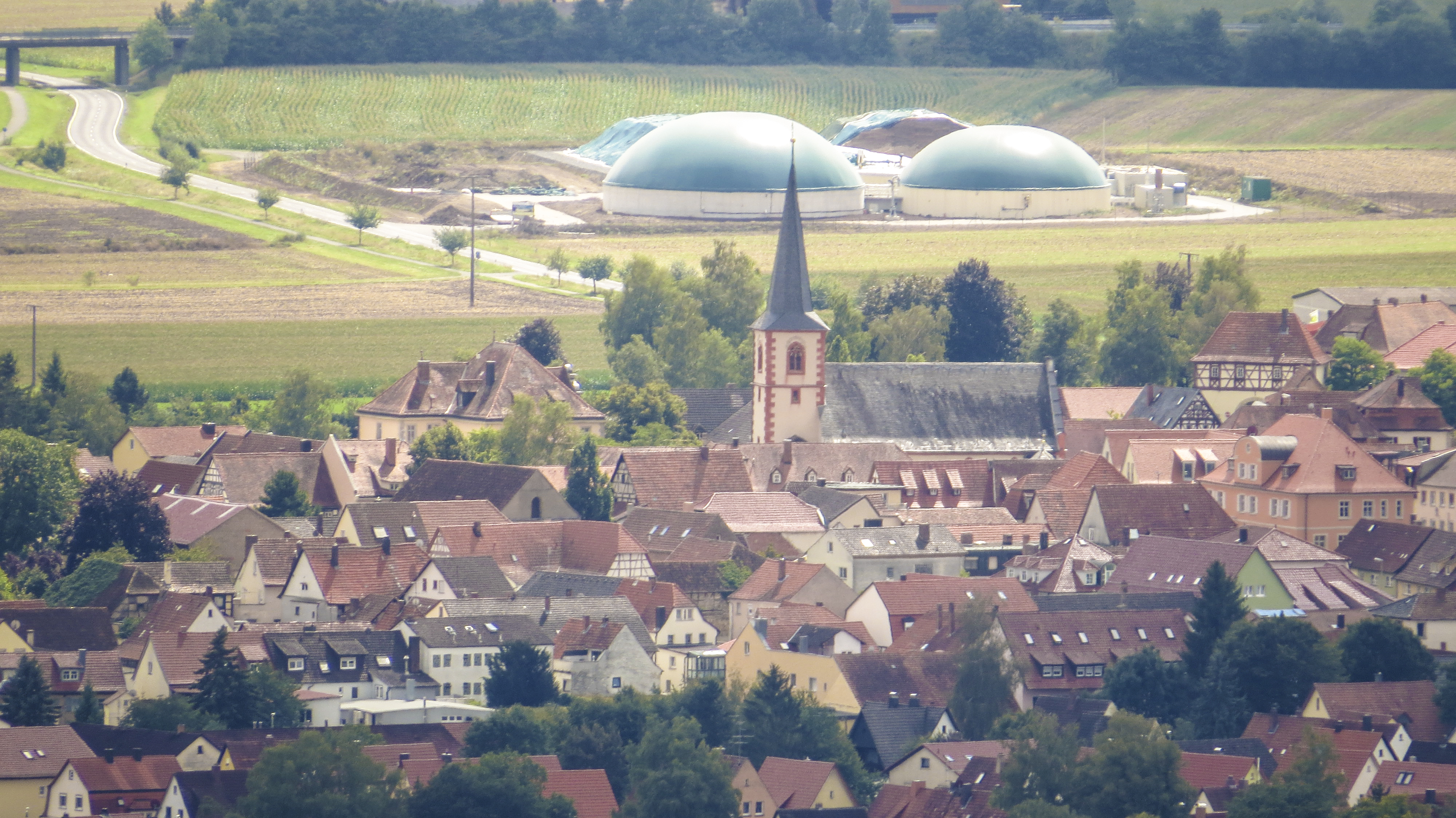 Hofheim in Unterfranken von Nordosten